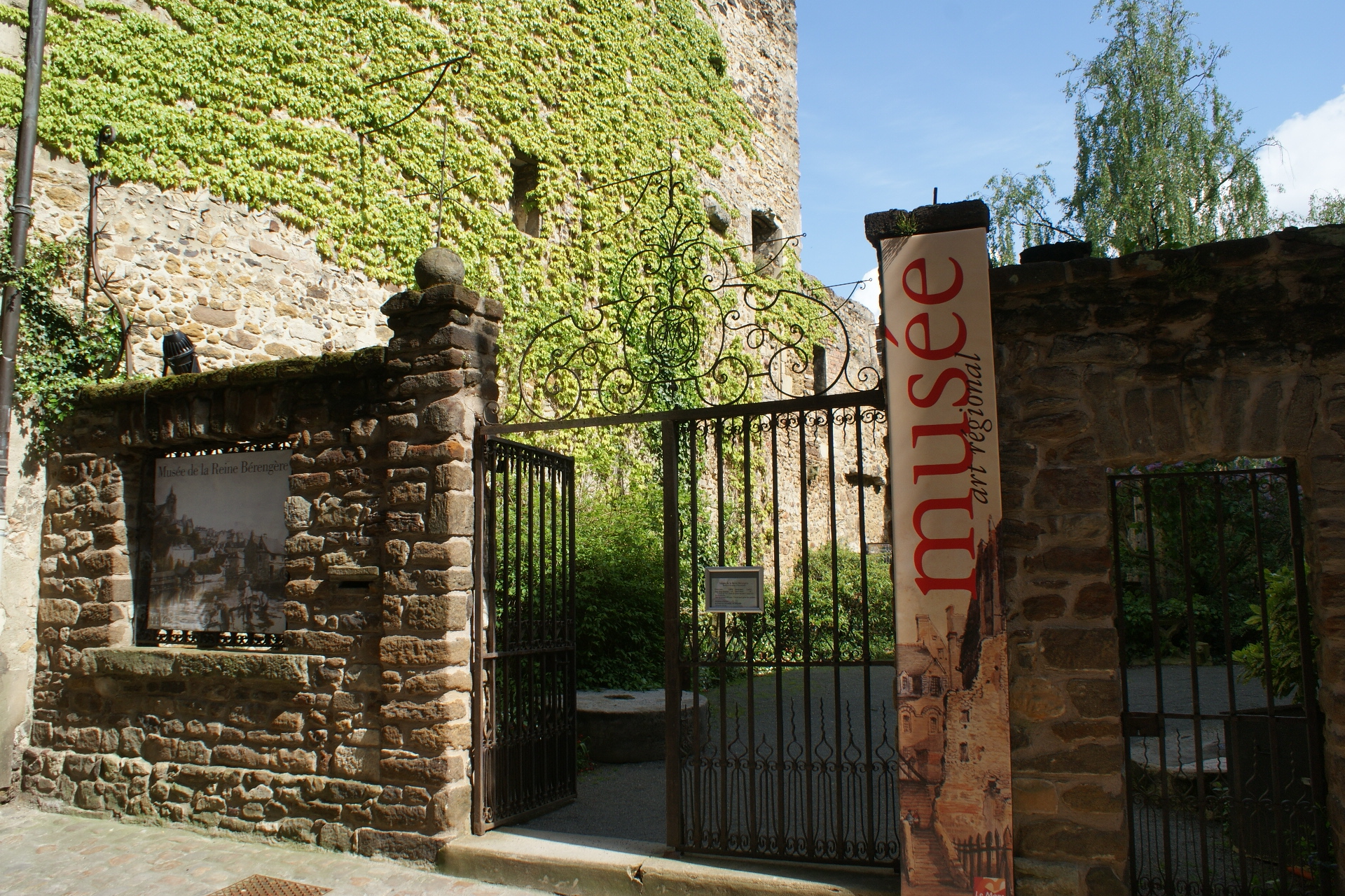 Le Musée de la reine Bérengère, musée d'art régional dans la ville du Mans, au coeur de la cité plantagenêt.